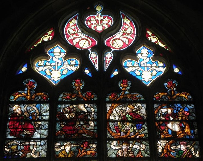 Baie 12 de l'église Saint-Ouen des Iffs (35).